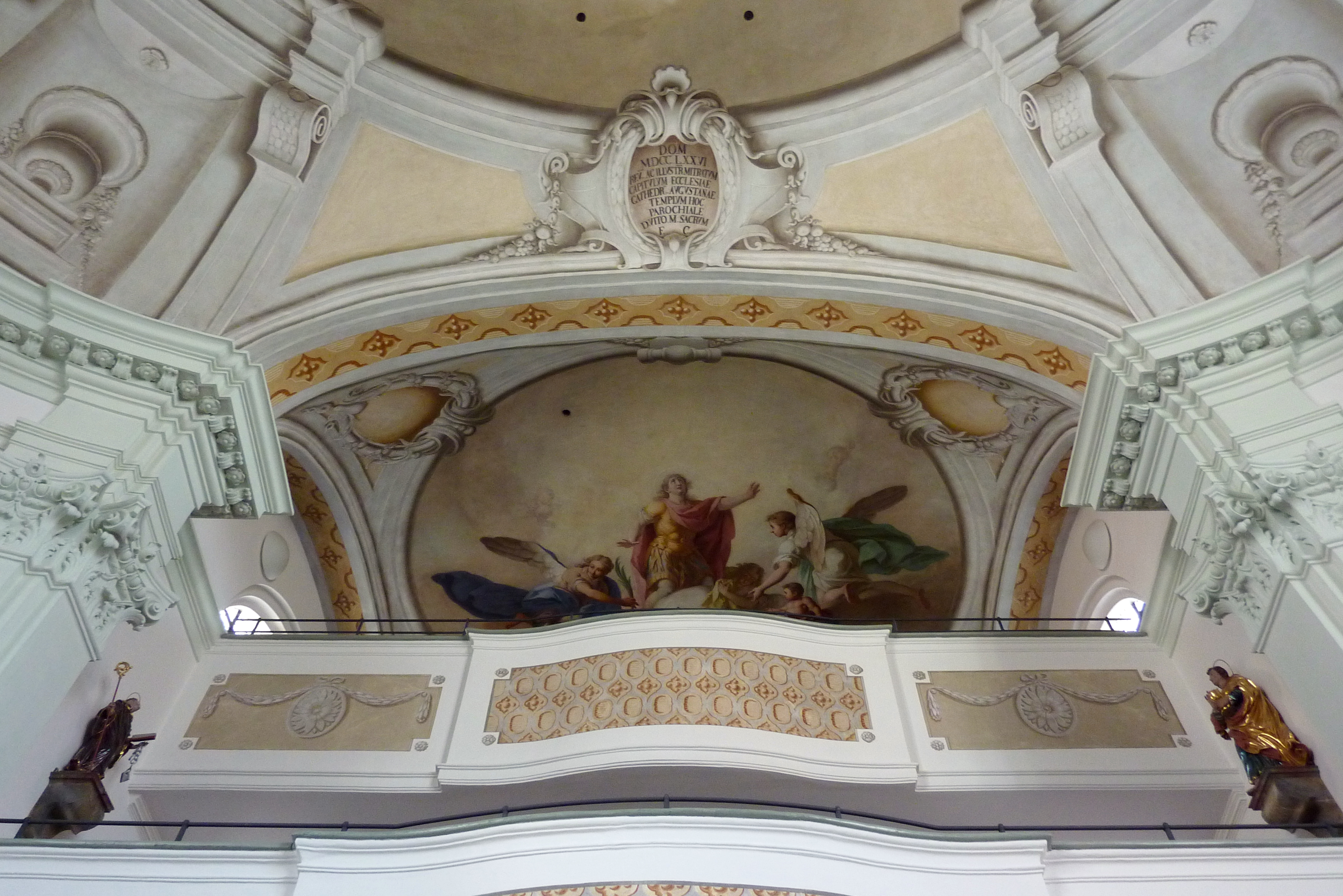 Katholische Pfarrkirche St. Vitus in Langweid am Lech im Landkreis Augsburg (Bayern), Empore